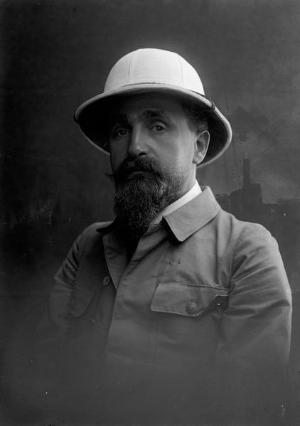 הרמן שטרוק.